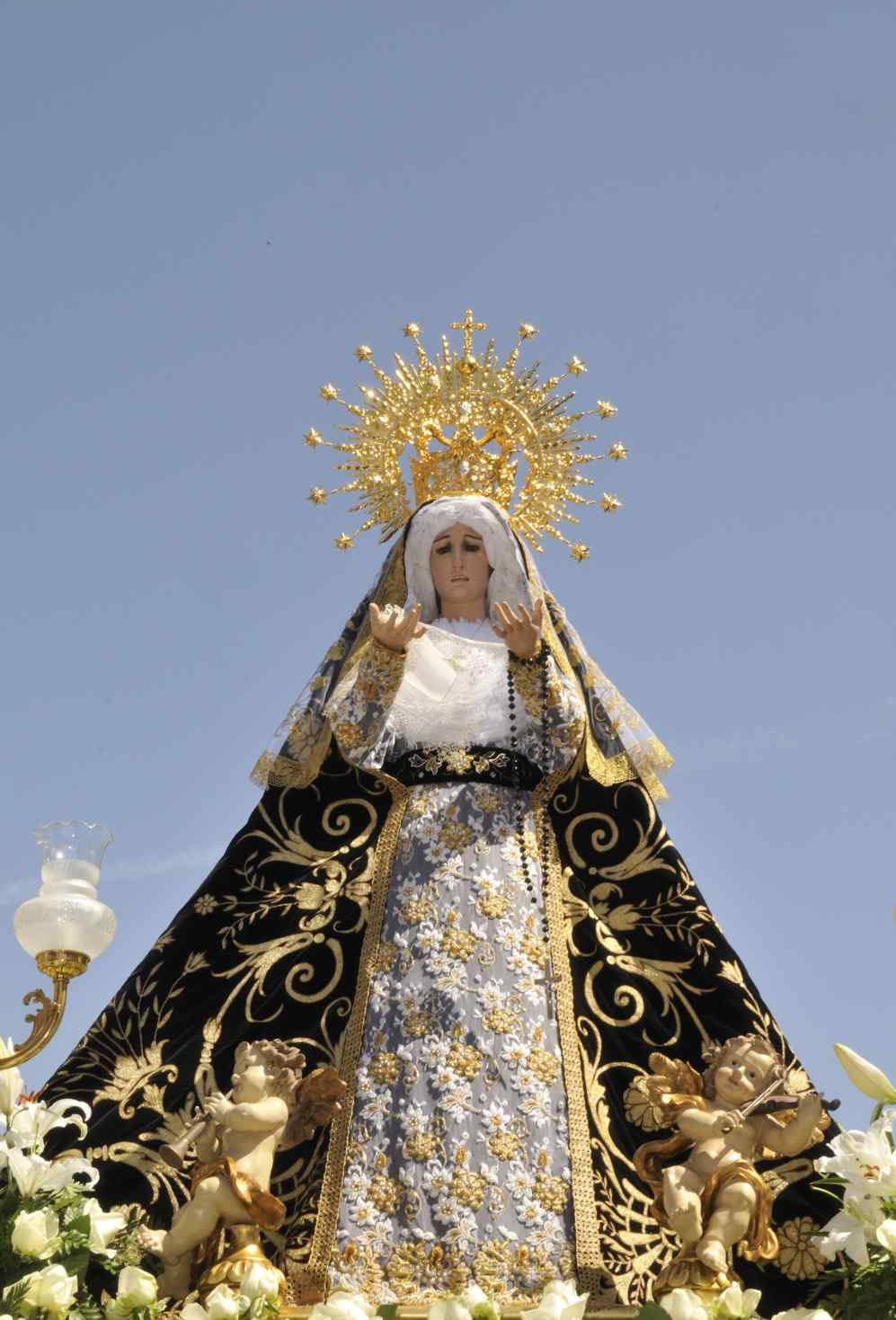 Ntra. Señora de la Soledad de Ocaña (Toledo)